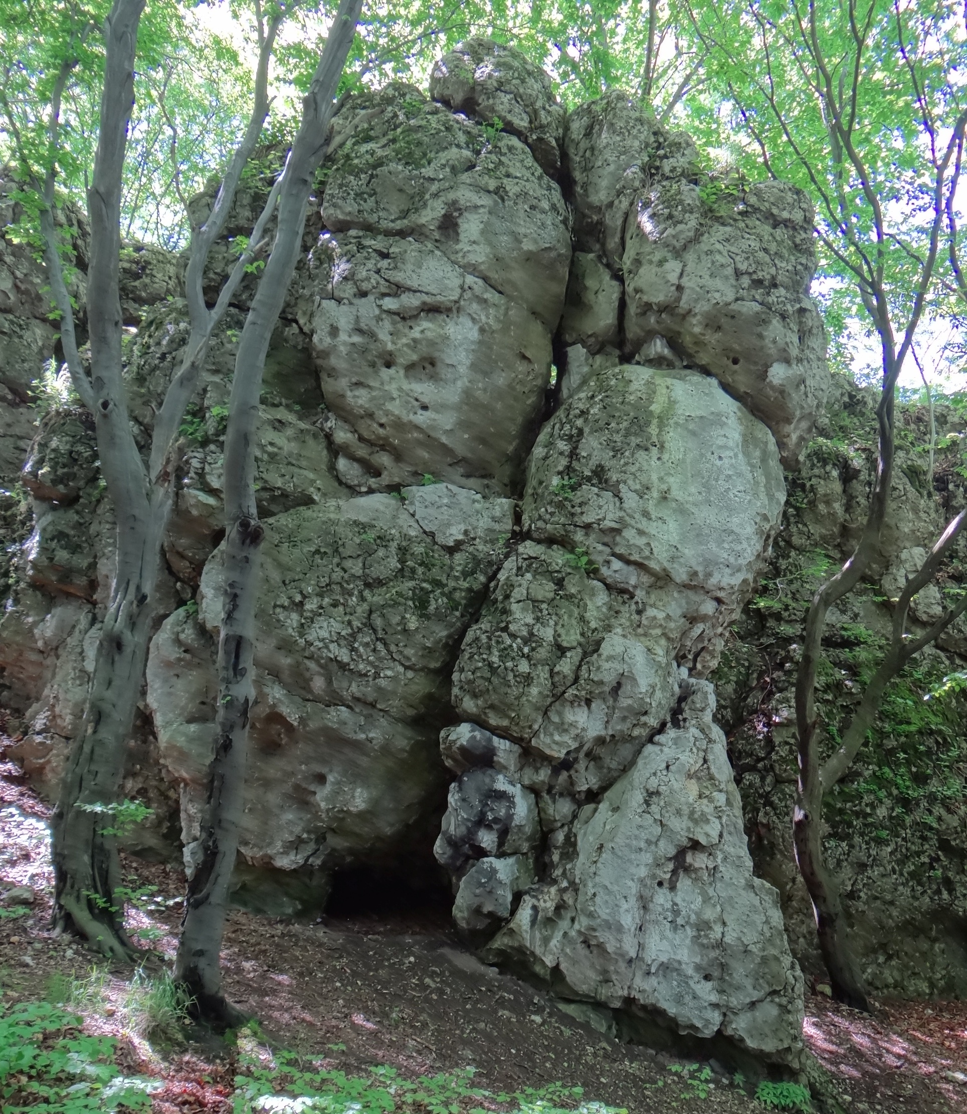 Skała Łopatka z otworem Jaskini między Schronami